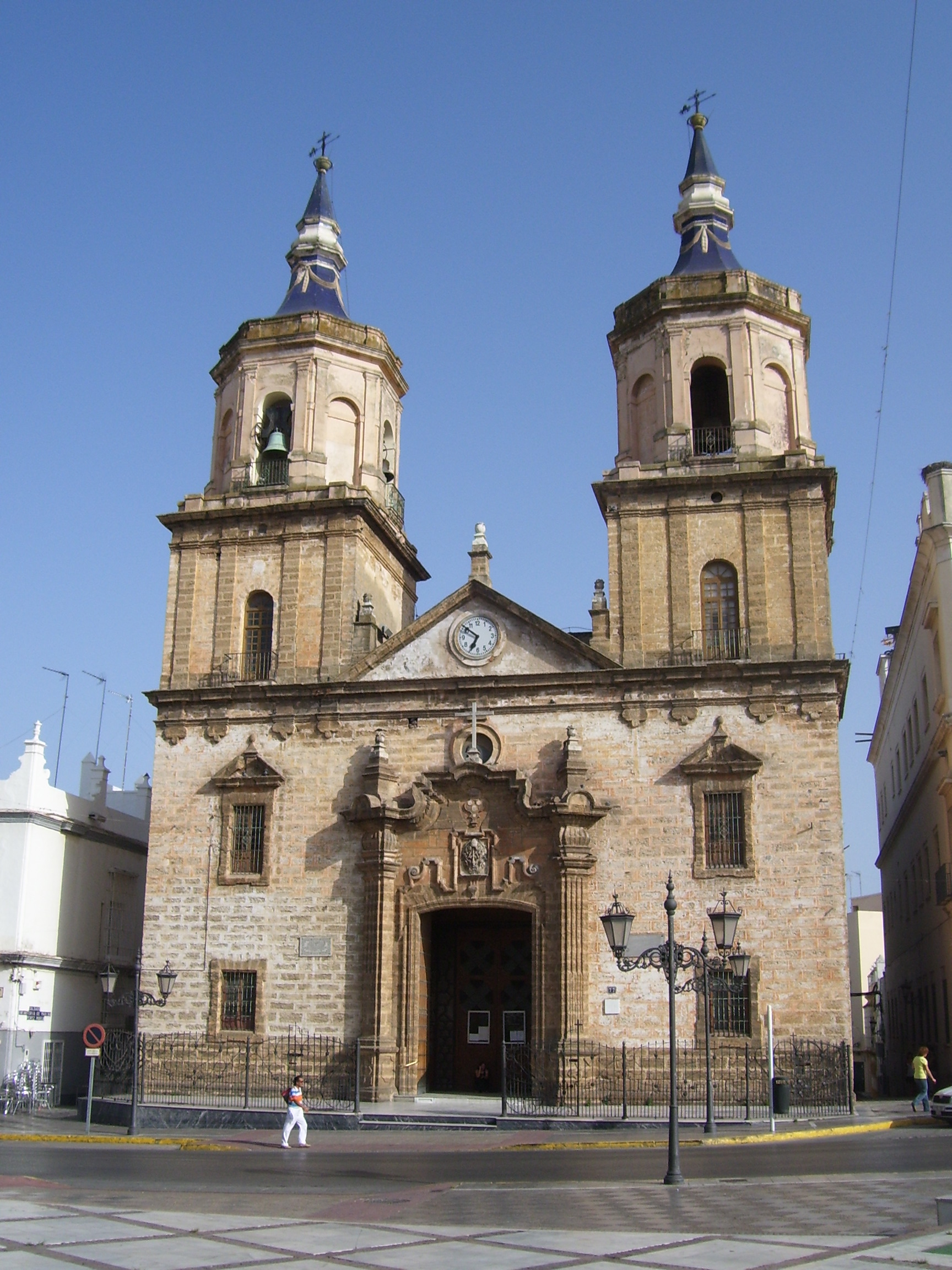 Vista de la Iglesia Mayor Parroquial de San Pedro y San Pablo, también conocida como "Iglesia Mayor", en la ciudad de San Fernando (Cádiz, España).